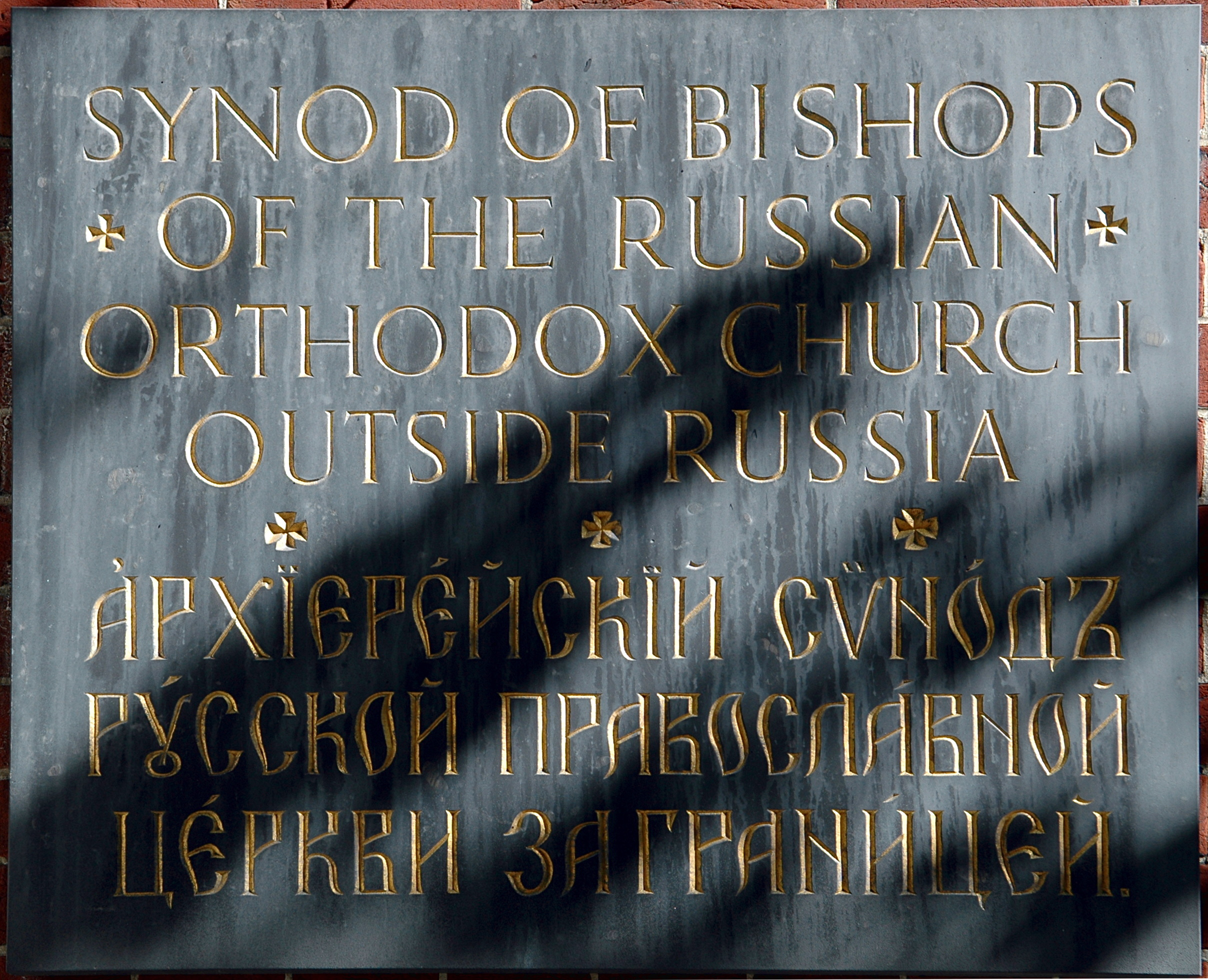 Табличка у входа в Архиерейский Синод РПЦЗ в Нью-Йорке